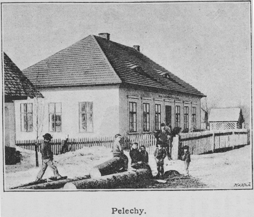 School in Pelechy (Bohemia), operated by Ústřední matice školská. Cropped from File:Skoly UMS Bruner-Dvorak.png